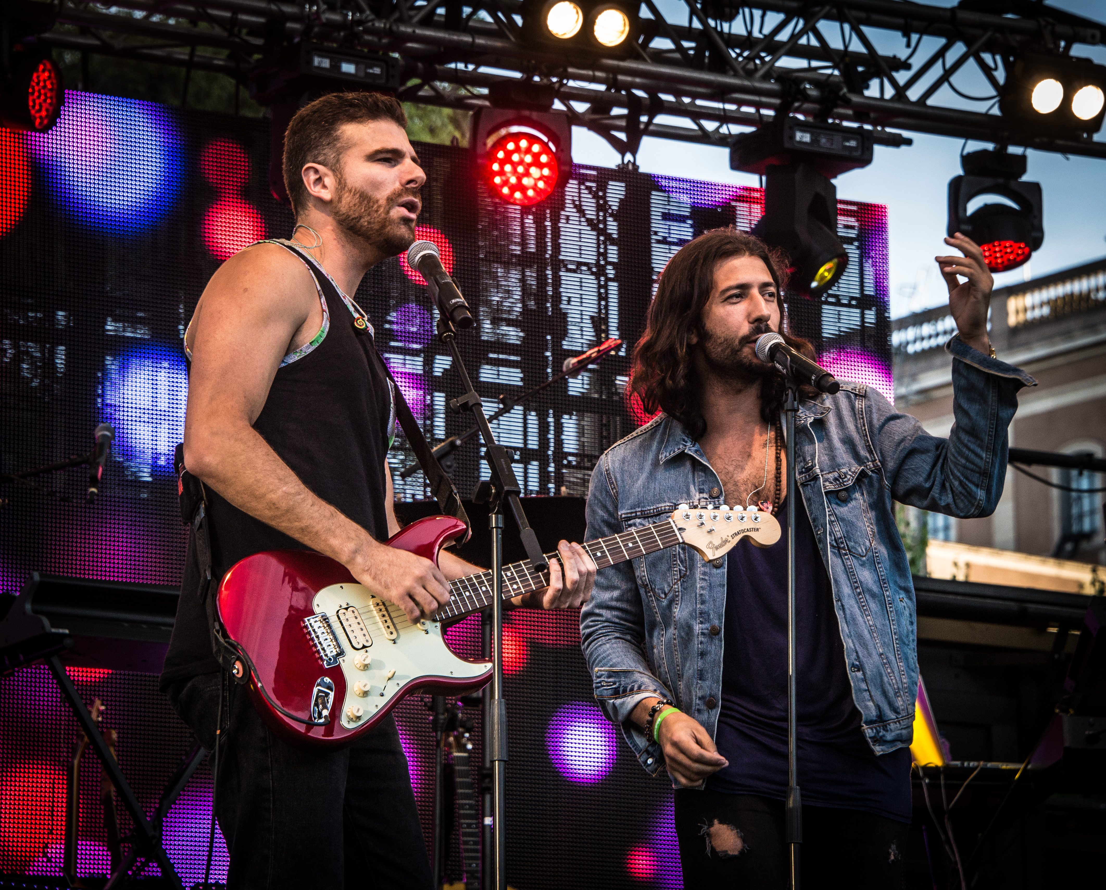 Magic! på RIX FM Festivalen 2016 i Kungsträdgården i Stockholm.